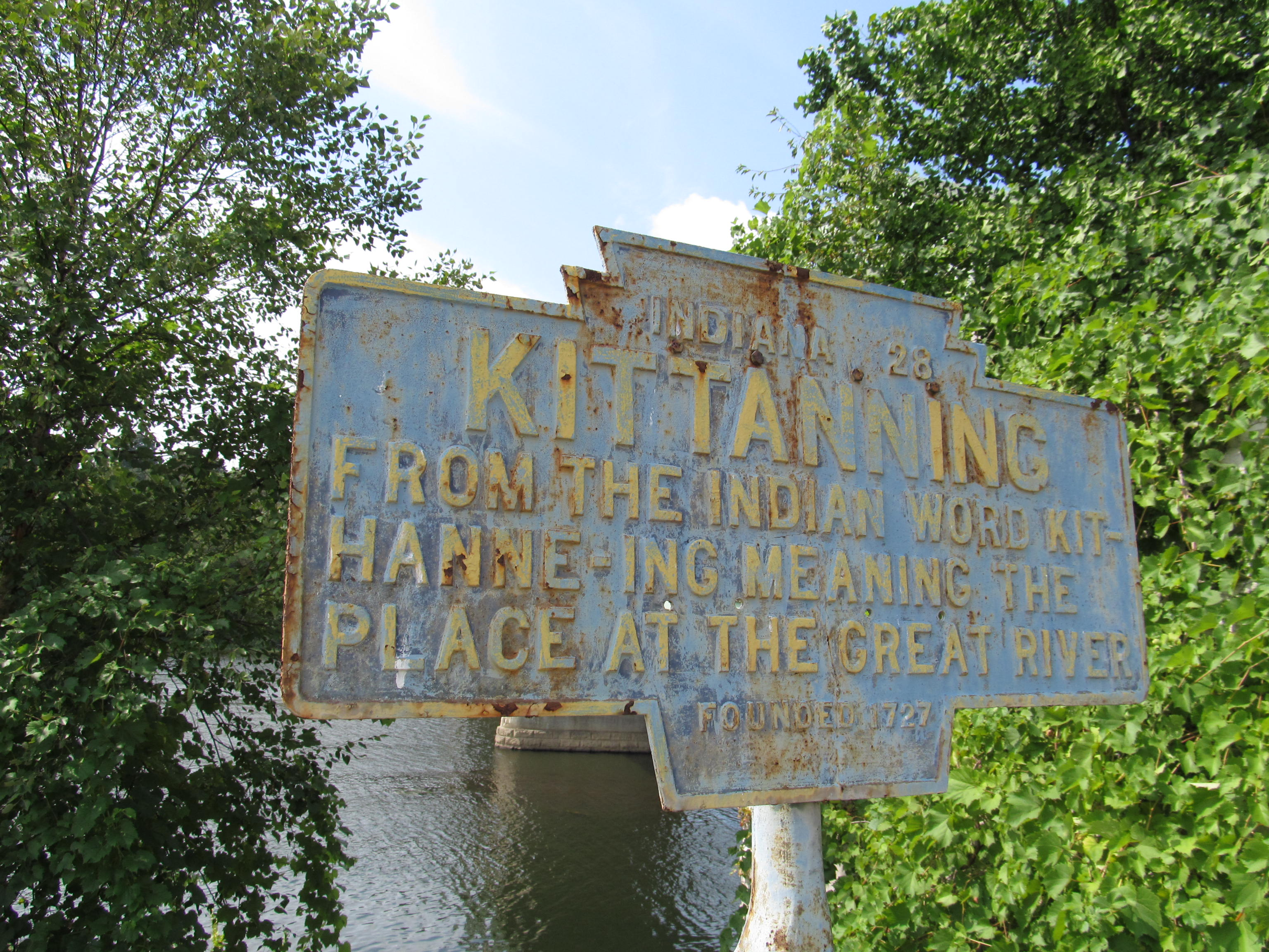 Keystone Marker for Kittanning, Pennsylvania